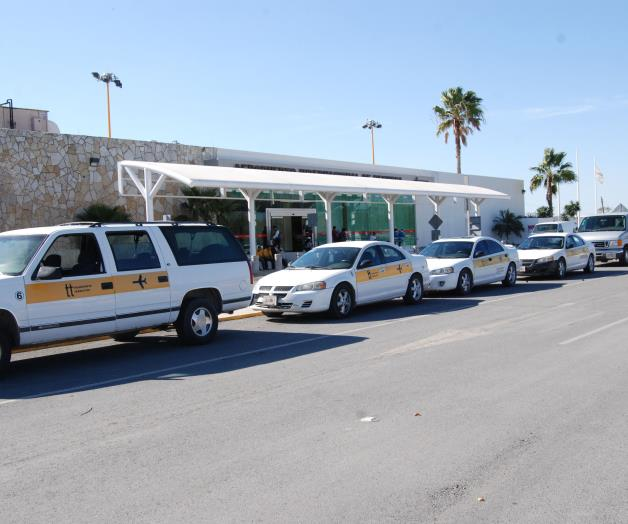 Aeropuerto De Reynosa